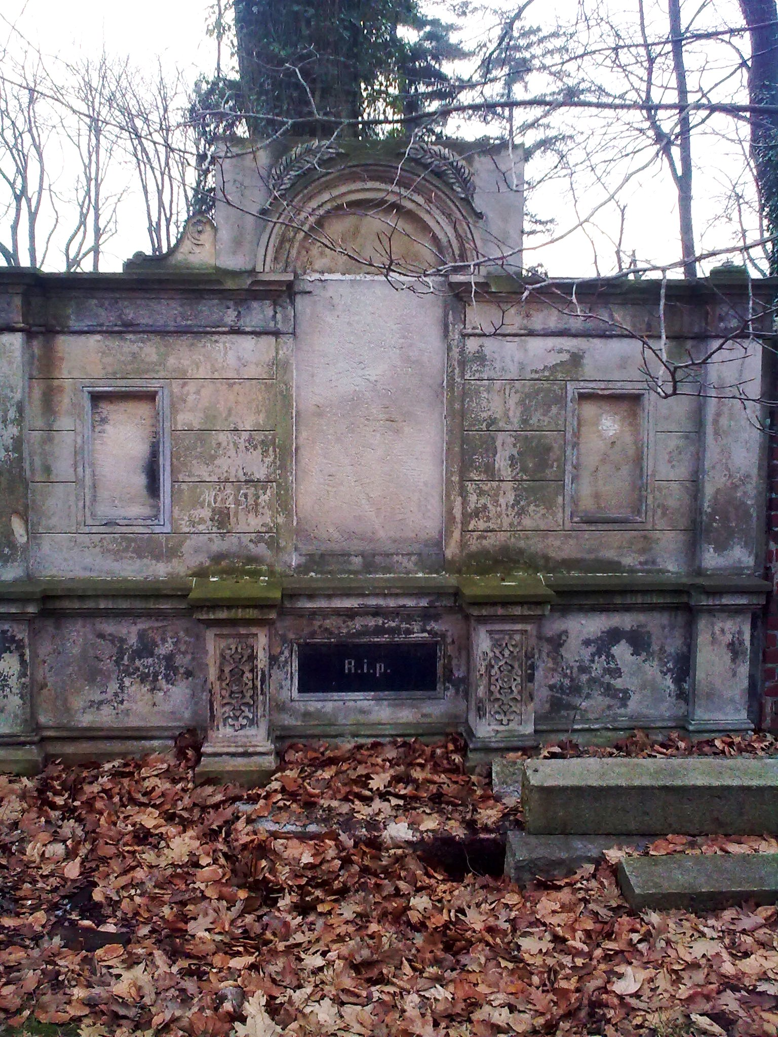 Grobowiec na cmentarzu, przy ul. Wrocławskiej w Opolu